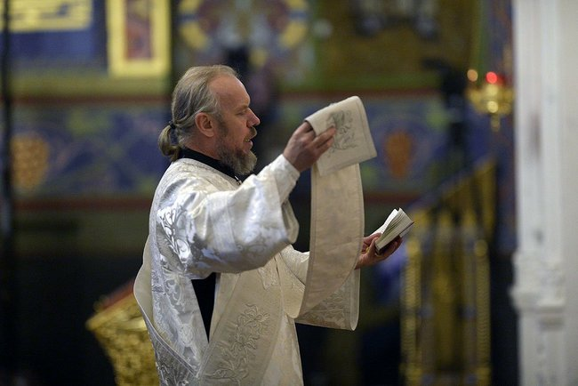 Присутствие В. В. Путина на праздничном рождественском богослужении в храме Нерукотворного Образа Христа Спасителя, построенном рядом с Олимпийским парком в Имеретинской низменности в Сочи.